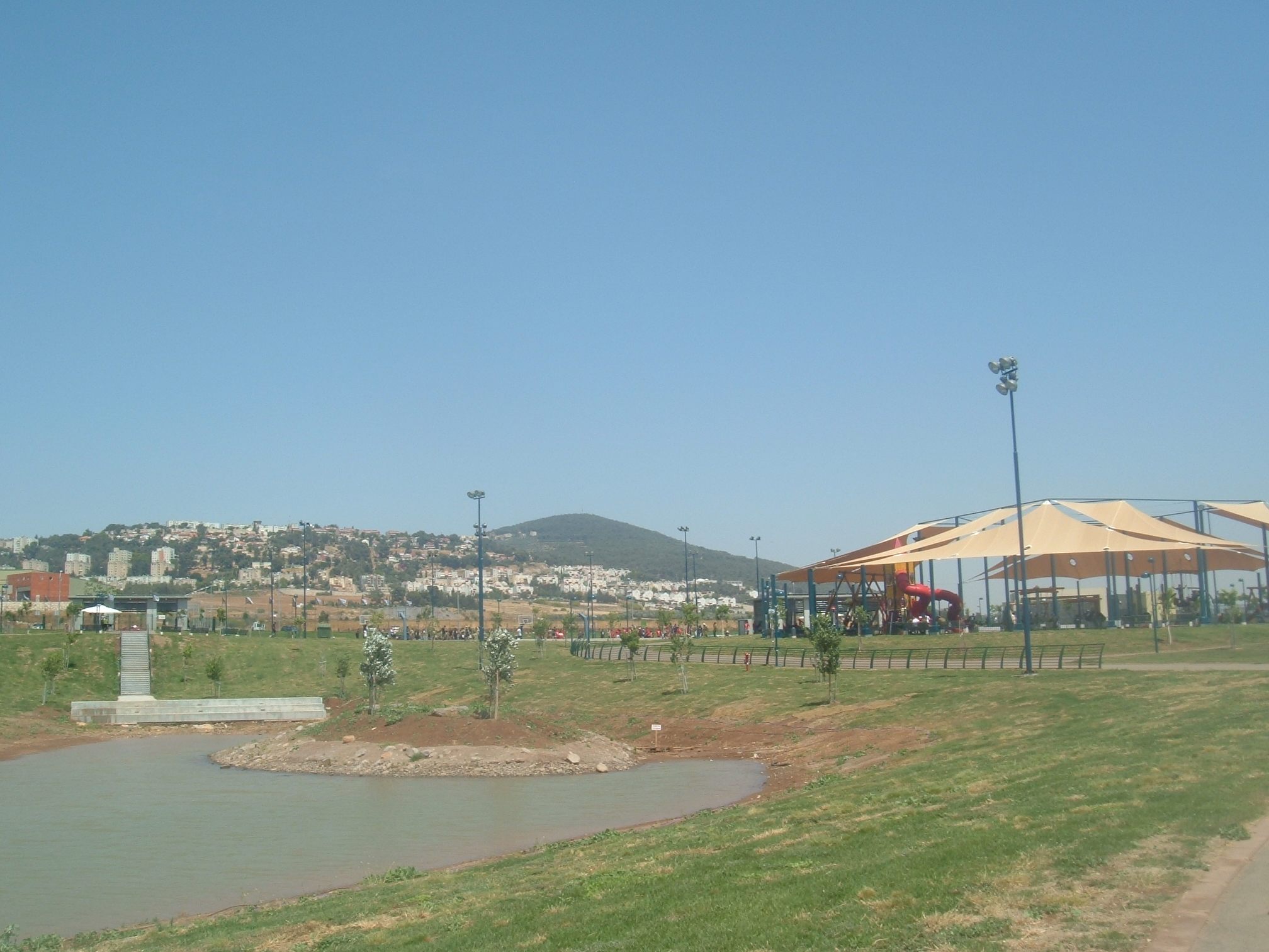 park afula פארק עפולה